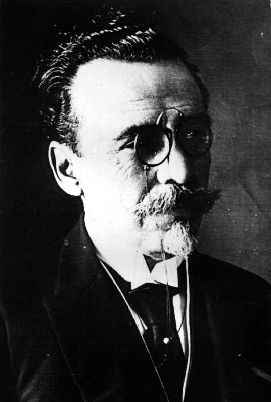 Fotografia de Nilo Peçanha, sétimo presidente do Brasil.